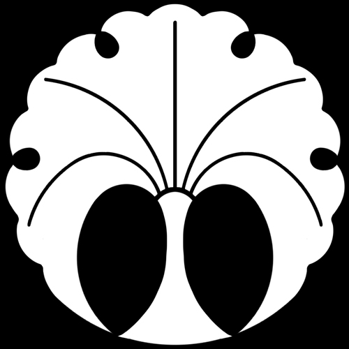 「立銀杏の丸」紋（染抜）